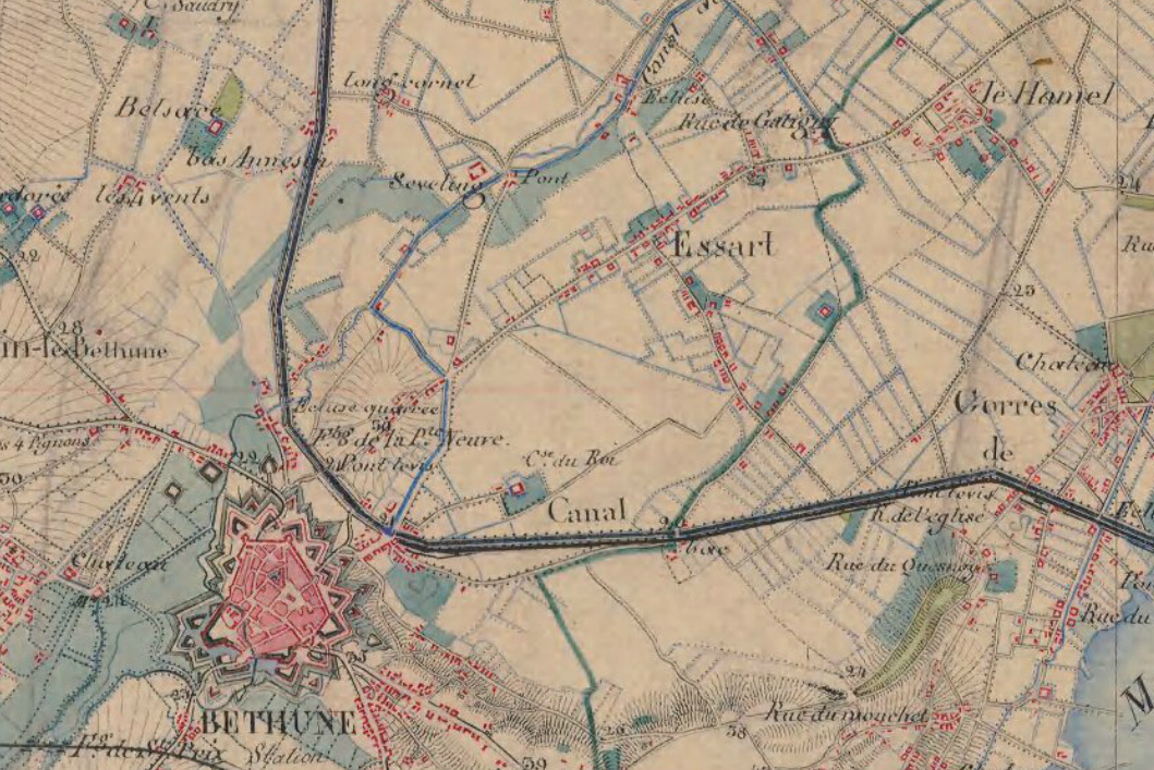 Essars sur carte d'Etat-major (publiée vers 1866 d'après des levés de 1832)